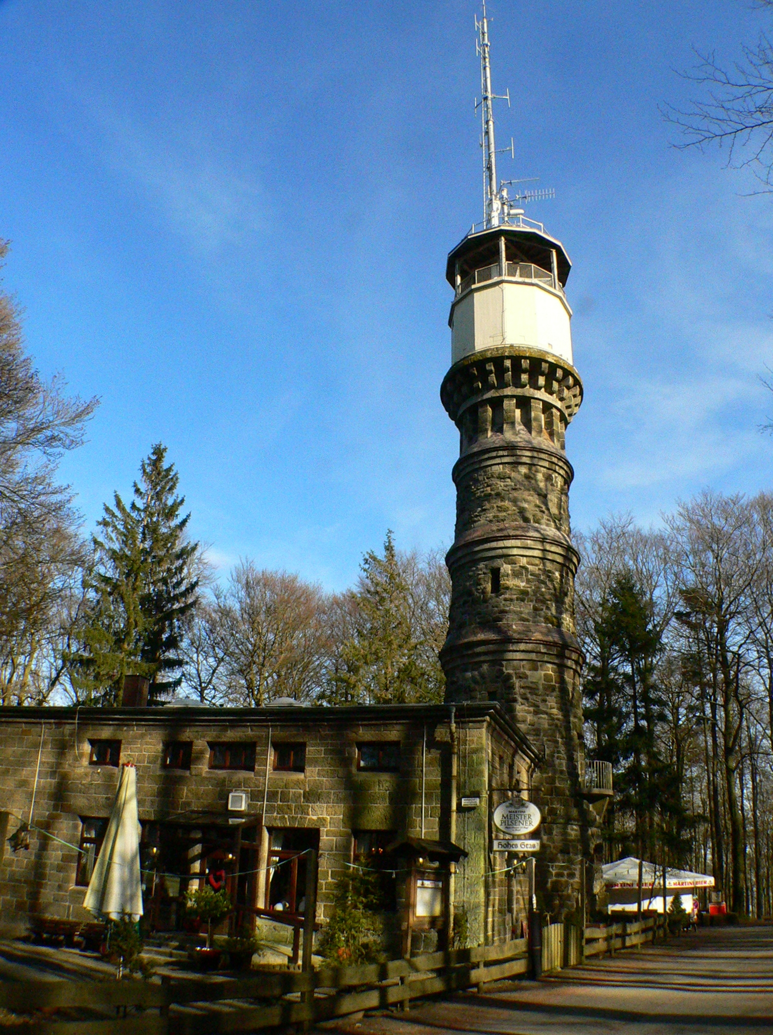 Habichtswald bei Kassel (Hessen), Aussichtsturm auf dem "Hohen Gras"